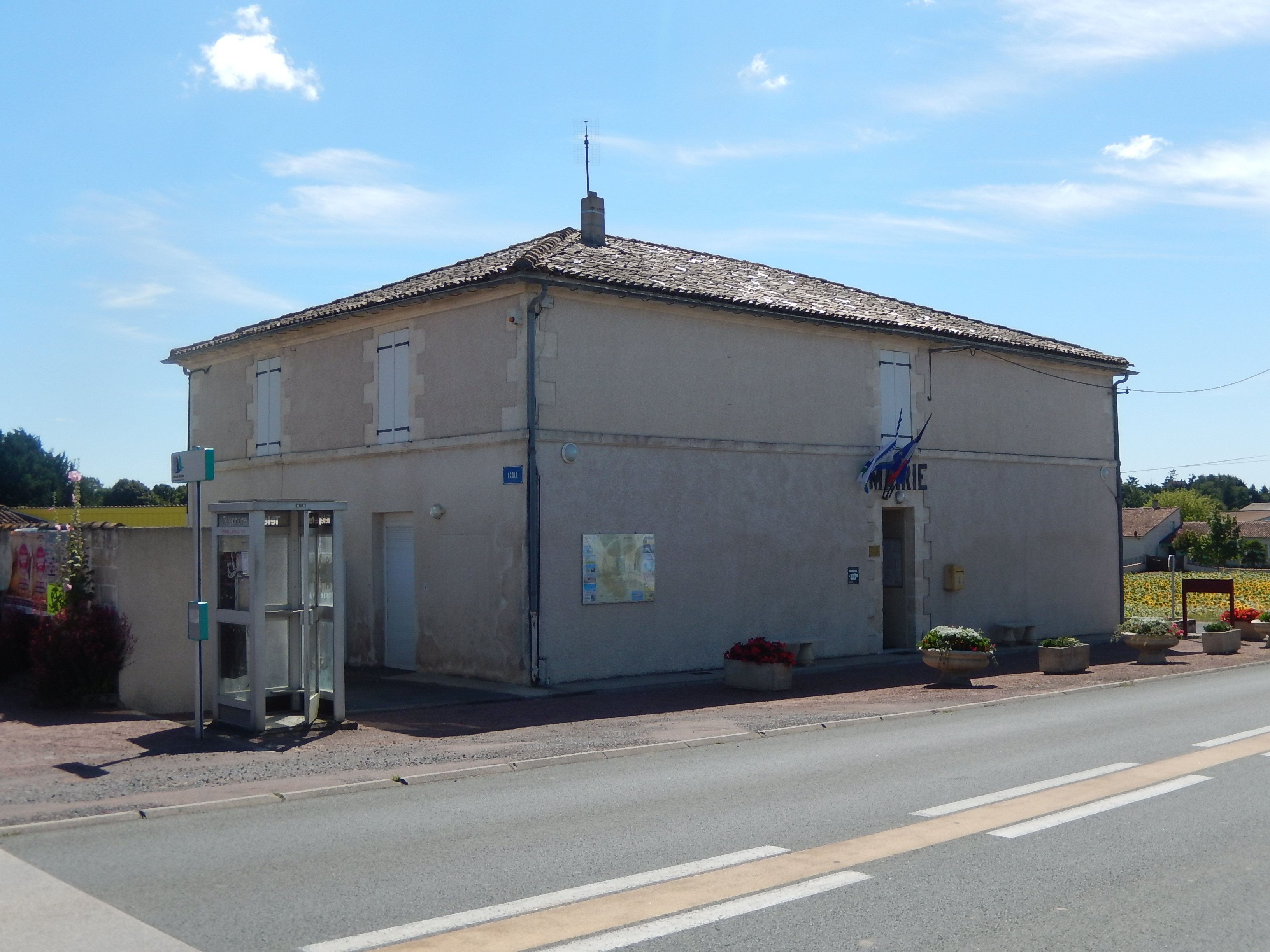 La mairie de la commune de Balanzac, en Charente-Maritime.